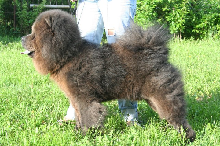 Көгілдір чау